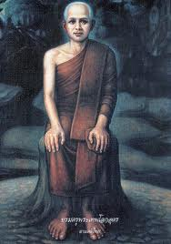 หลวงปู่ใหญ่เทพโลกอุดร